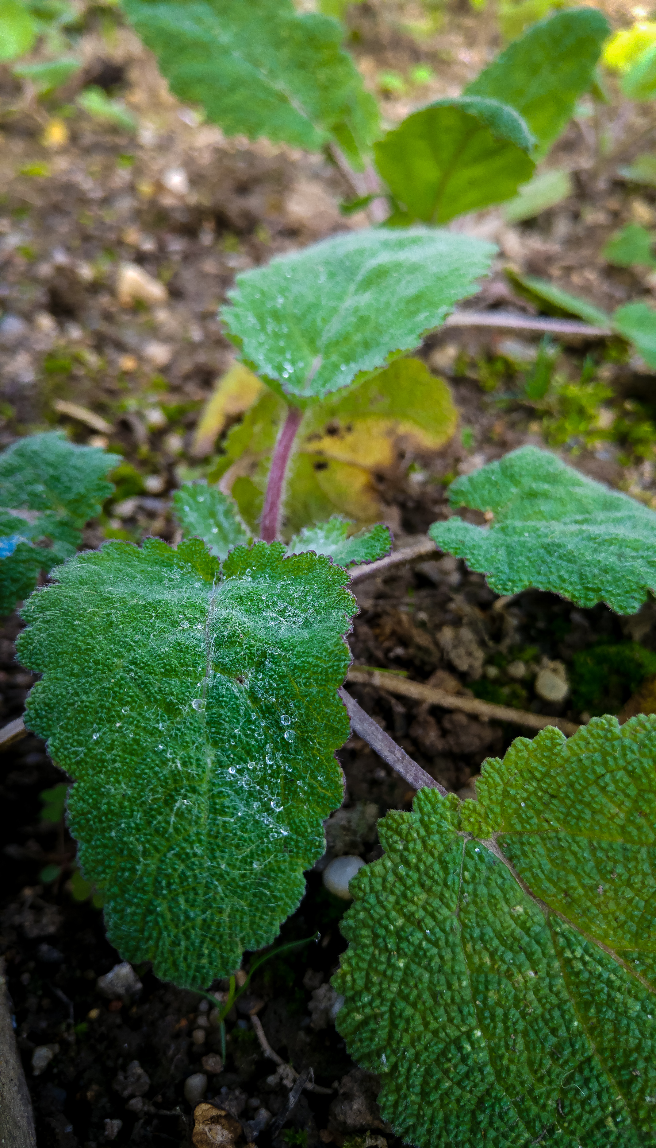 Der Muskatellersalbei (Salvia sclarea), Muskat-Salbei